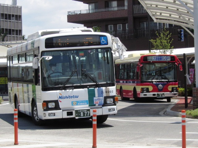 JR久留米駅前バスのりばにて、西鉄バスと堀川バス。「久留米市」向けにアップロード。